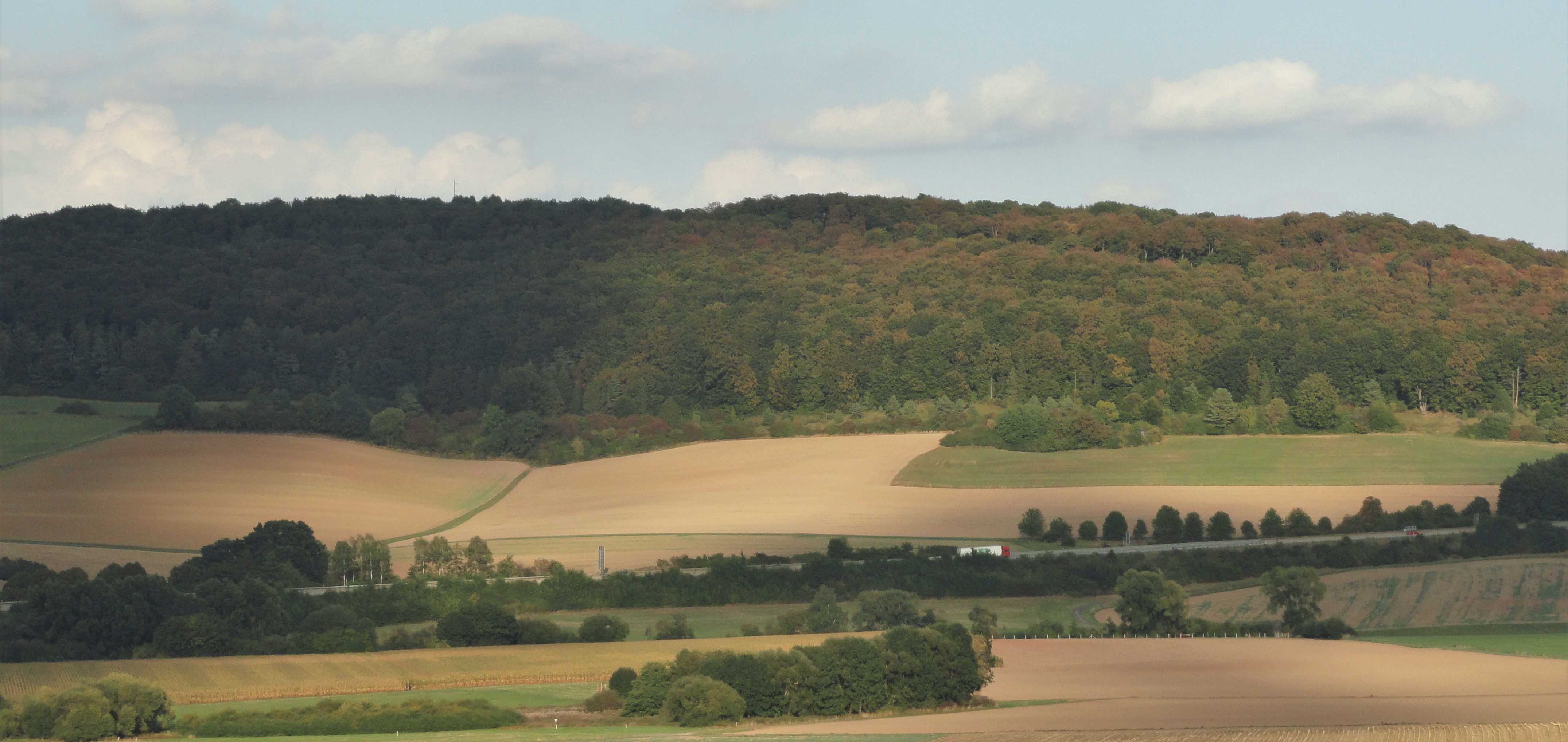 Quast von Rhoden im Spätsommer mit A44